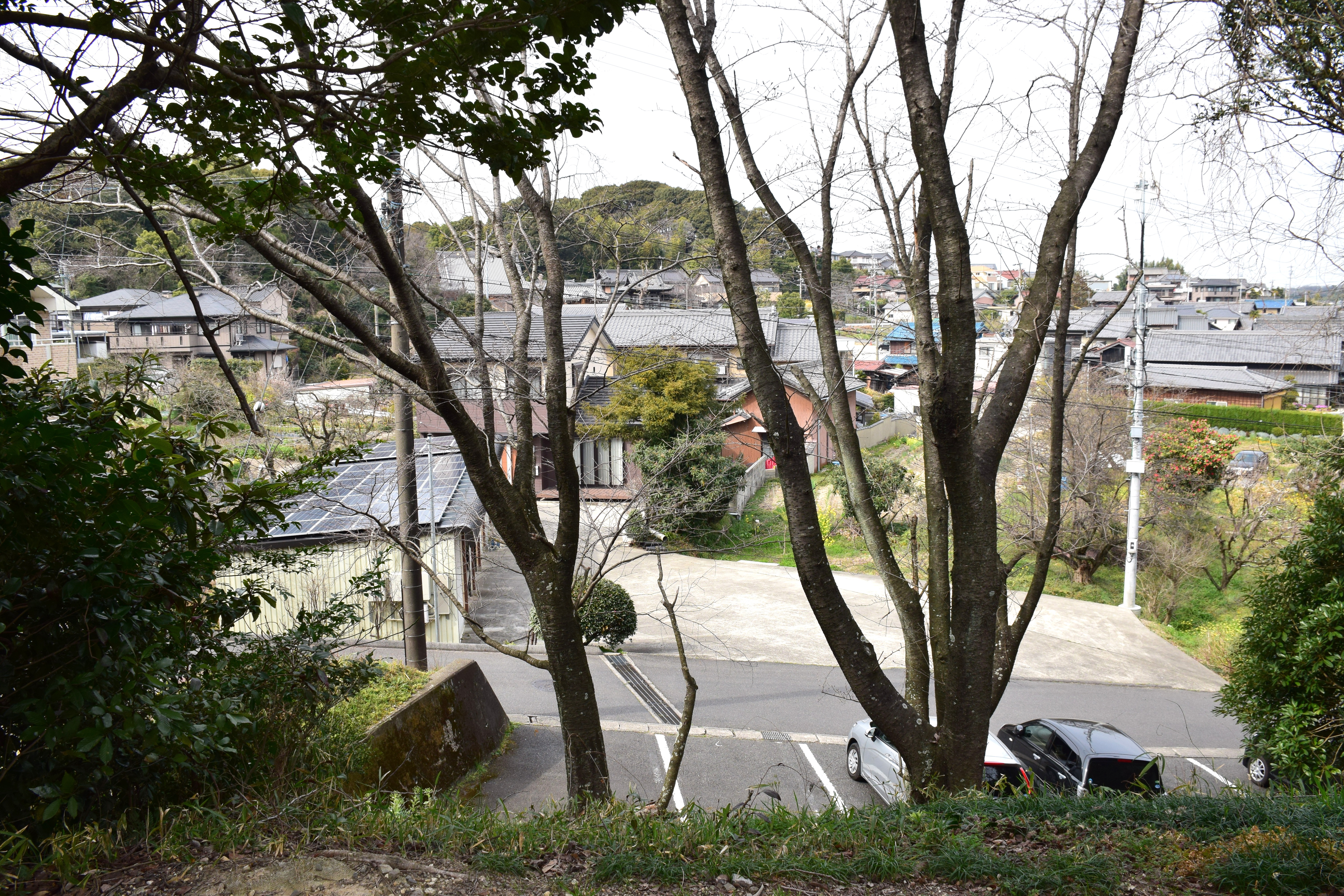 坂部城跡より洞雲院を望む